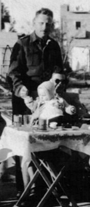 משפחת לוץ